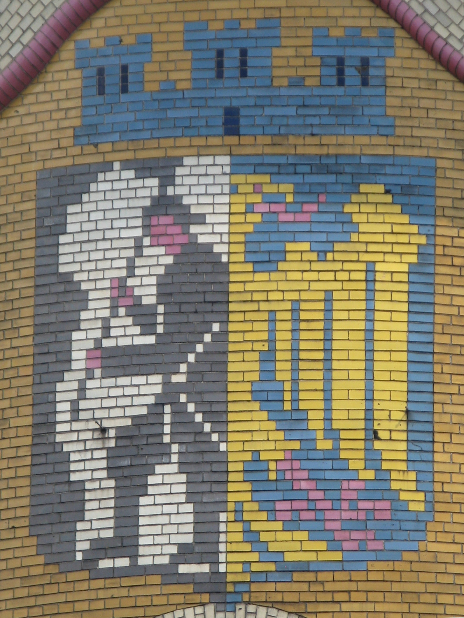 Herb Bytomia z coroną muralis na elewacji budynku IV liceum w Bytomiu przy placu gen. W. Sikorskiego.